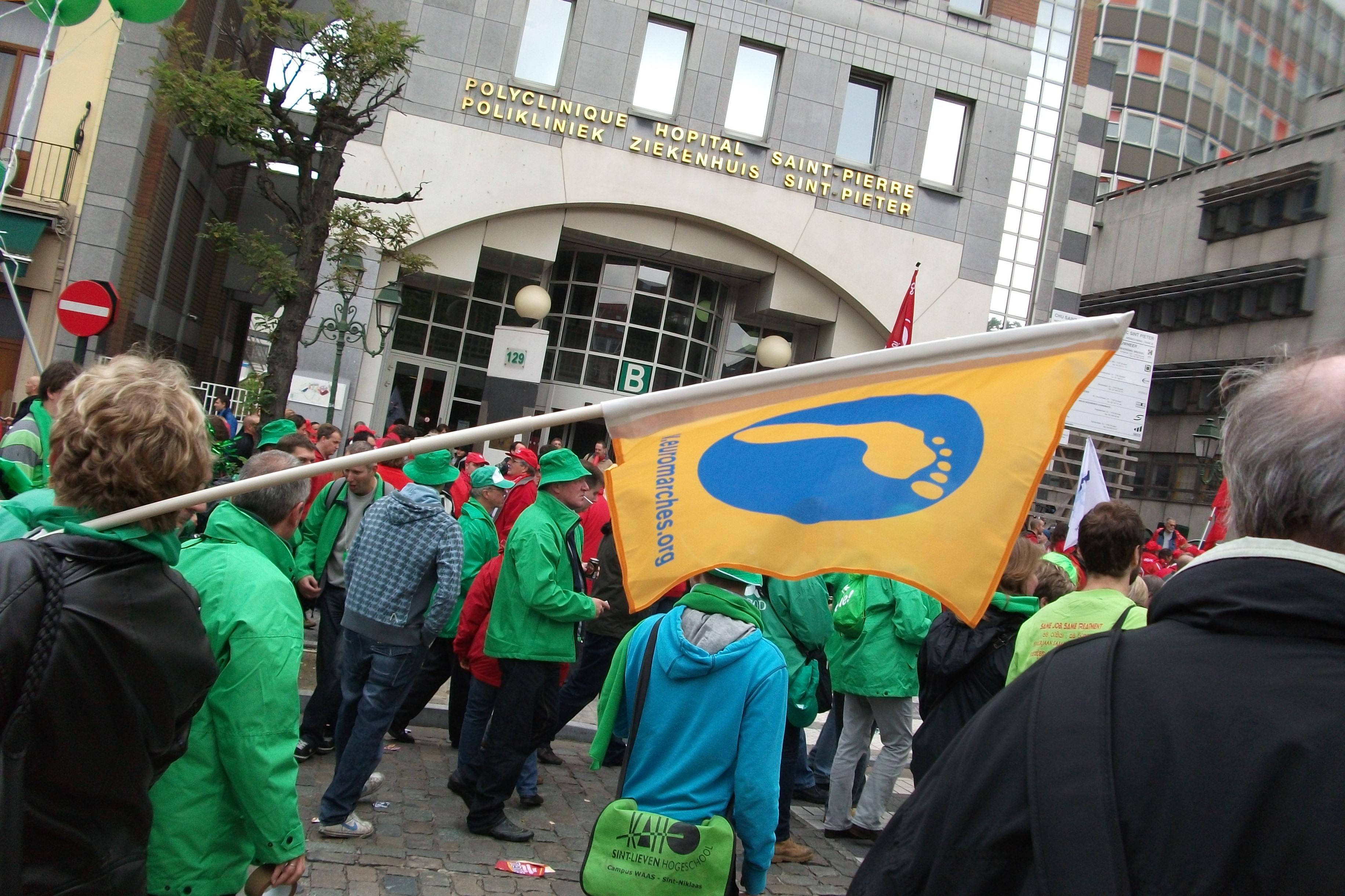 manifestation européenne de Bruxelles 2010 contre les politiques d'austérité, drapeau d'euromarches.